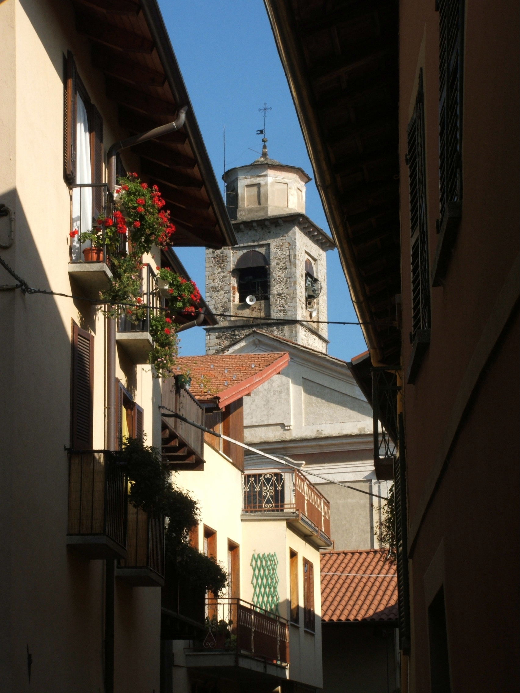 La via principale del centro storico medioevale di Guardabosone, comune della provincia di Biella (Piemonte, Italia)